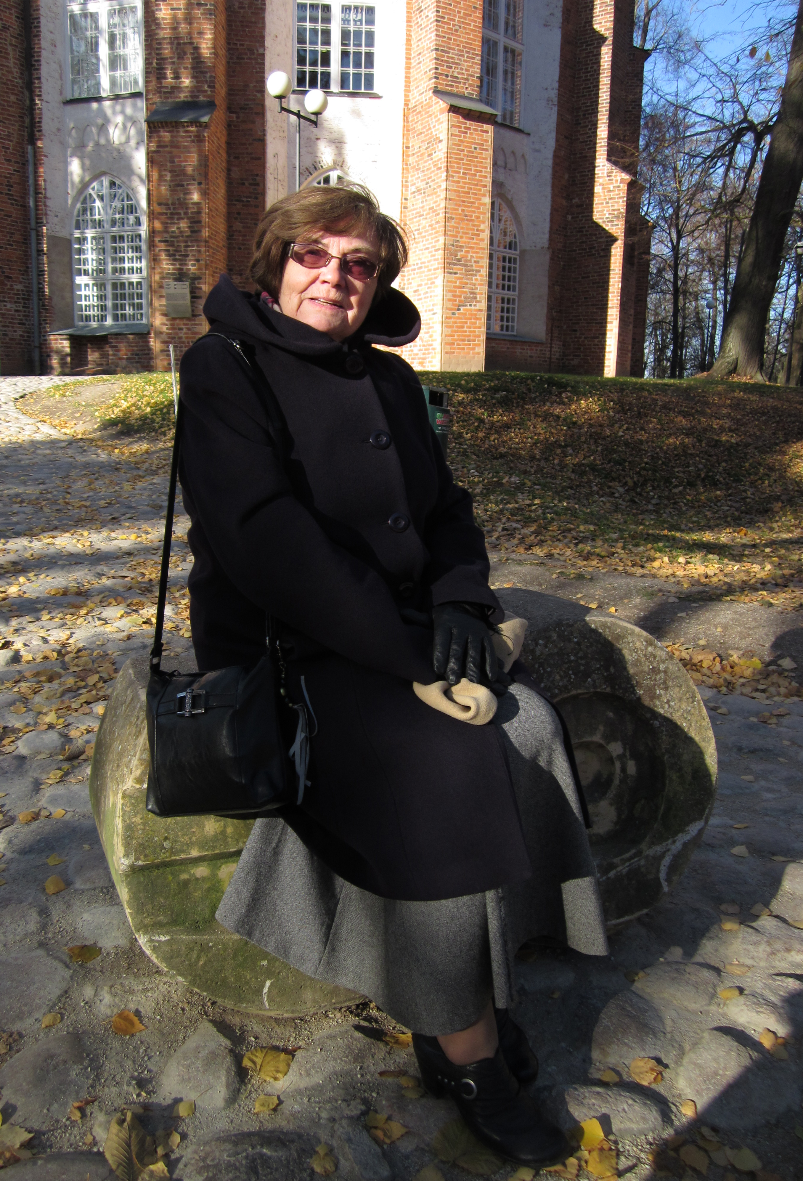 Mare Rand 25. oktoobril 2017 Tartus, Toomemäel ülikooli ajaloo muuseumi ees